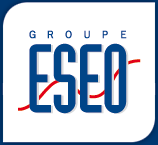 Logo de l'école supérieure d'électronique de l'Ouest